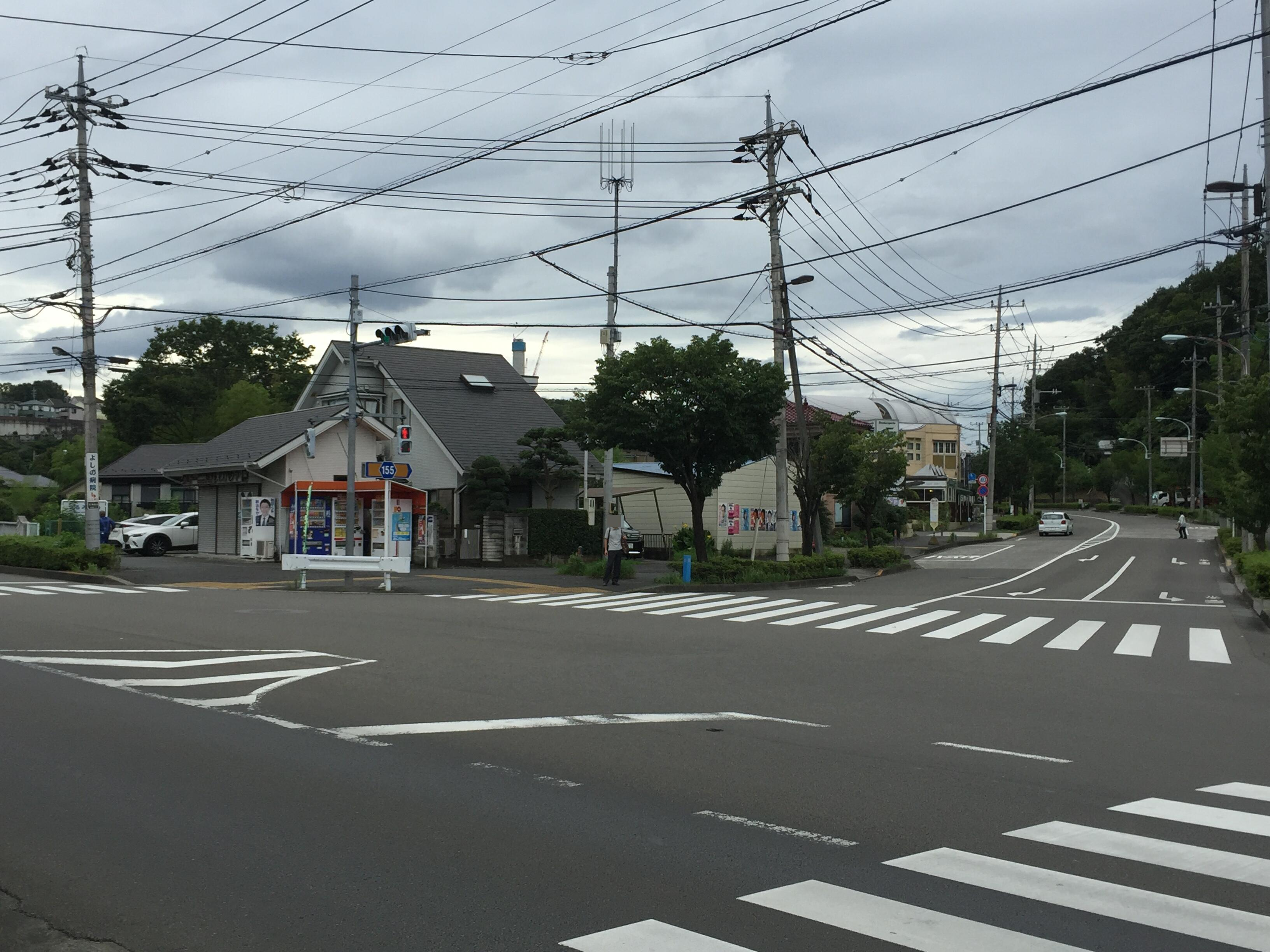 図師大橋交差点（町田市図師町）。右正面が都道156号線・小山田方面起点。